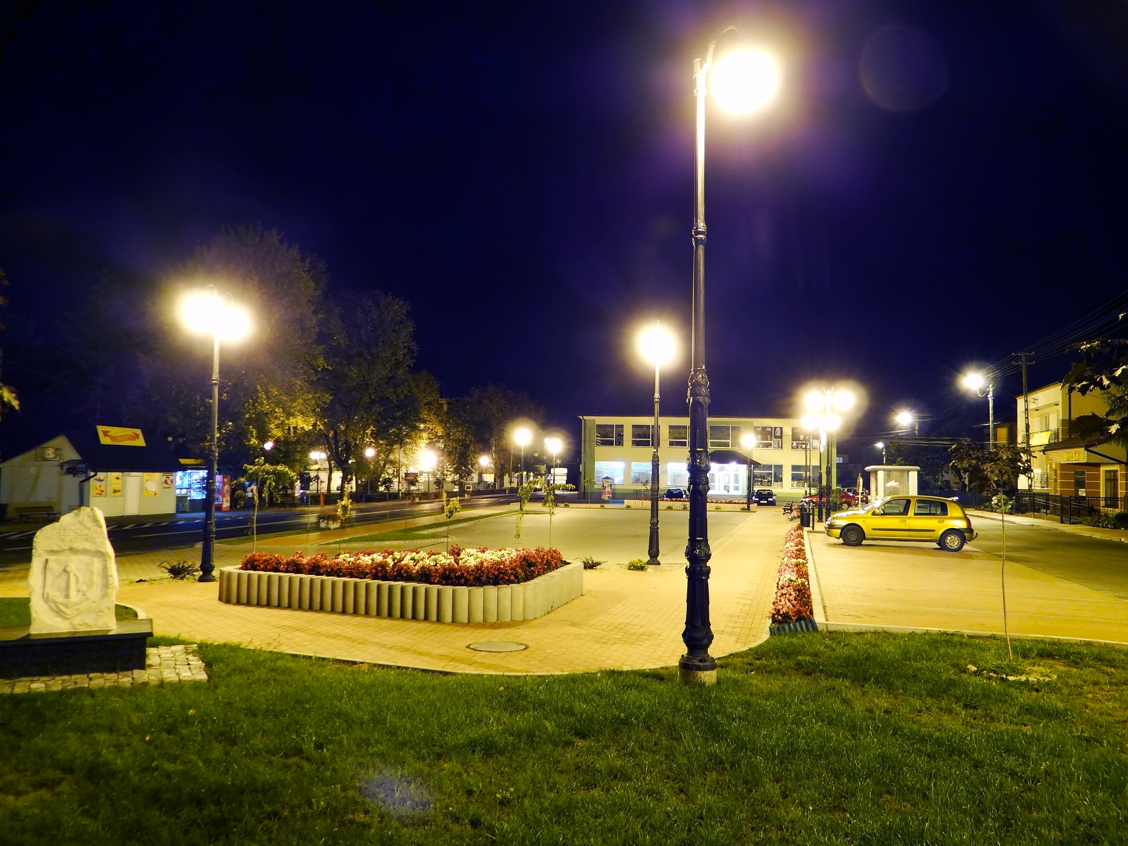 Zdjęcie wykonane na Rynku w Krzeszowie.